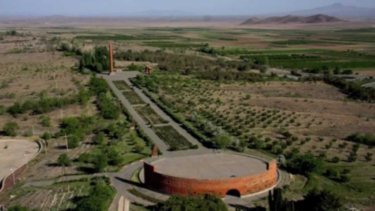 Мемориал «Сардарапат», вид сверху